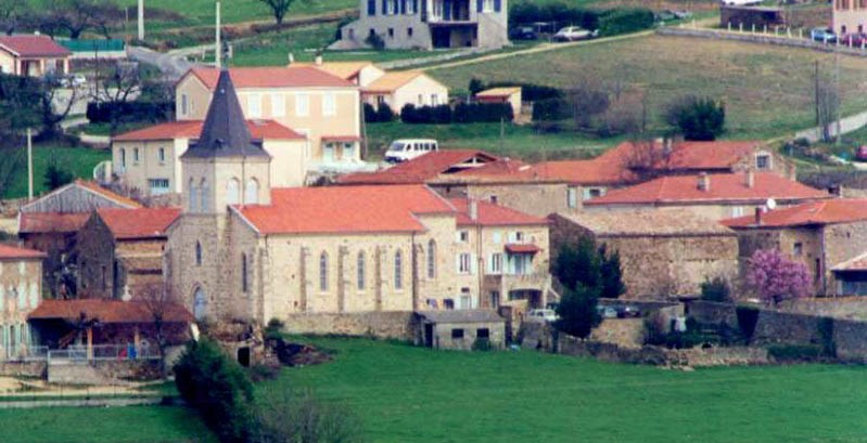 Savas église extérieur